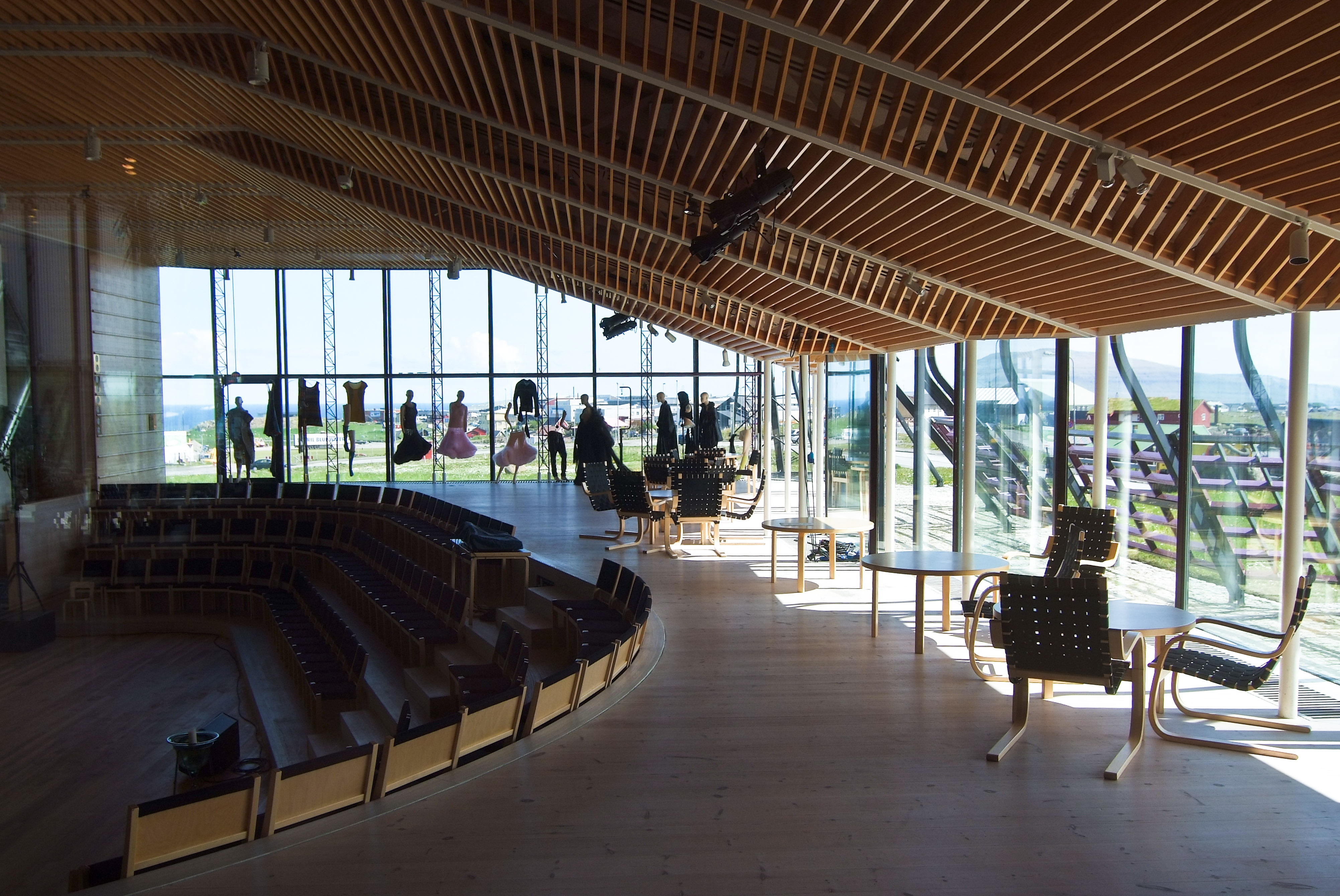 Norðurlandahúsið